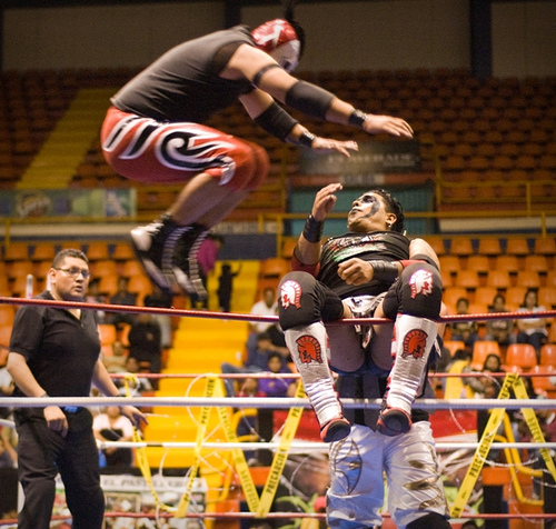 DTU - Desastre en Queretarock